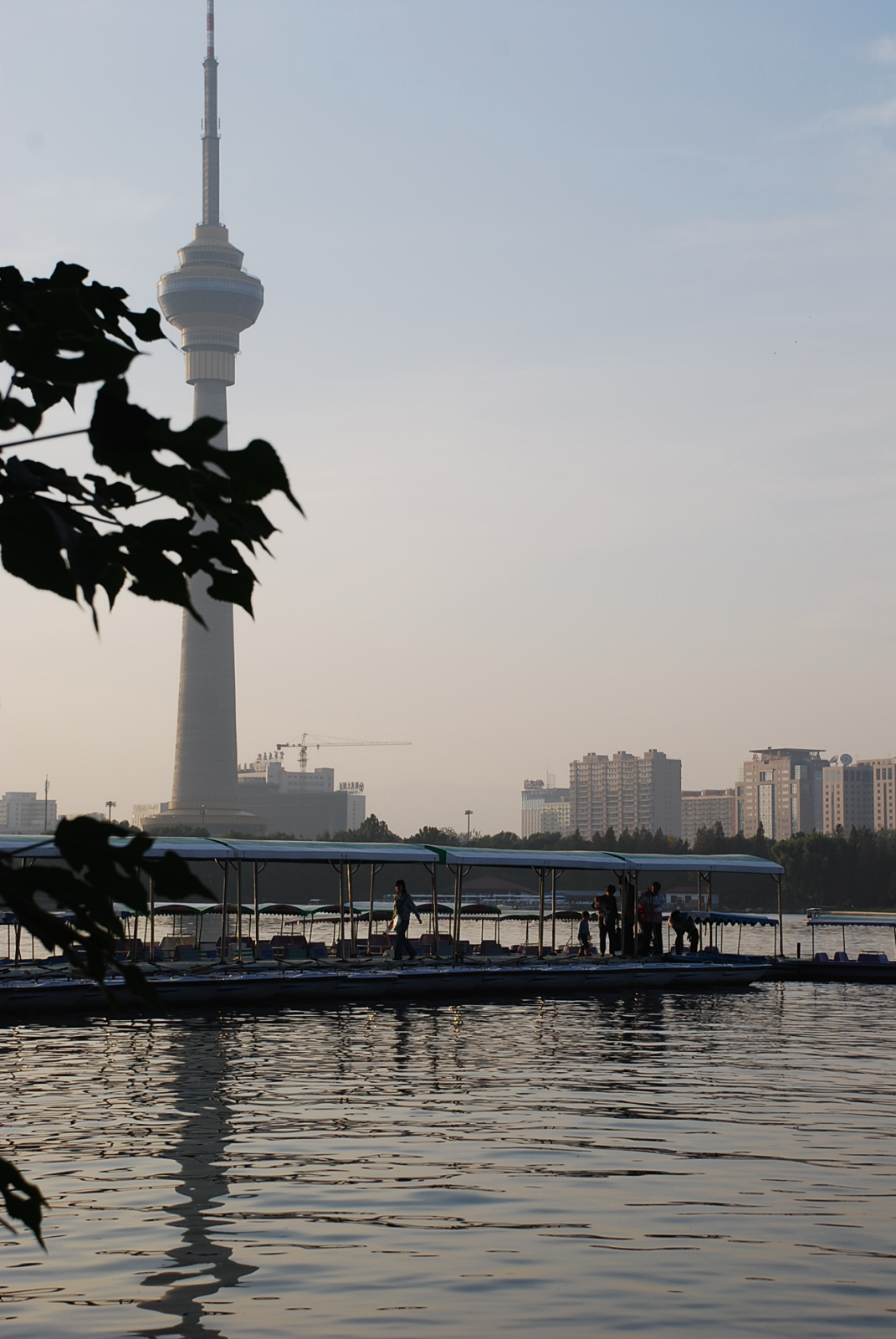 玉渊潭游船码头